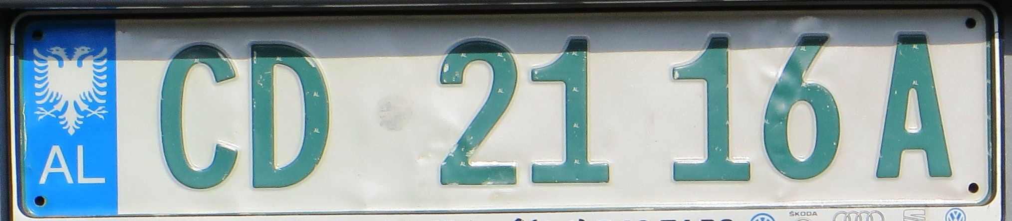 Nieuwe CD kenteken plaat Albanië